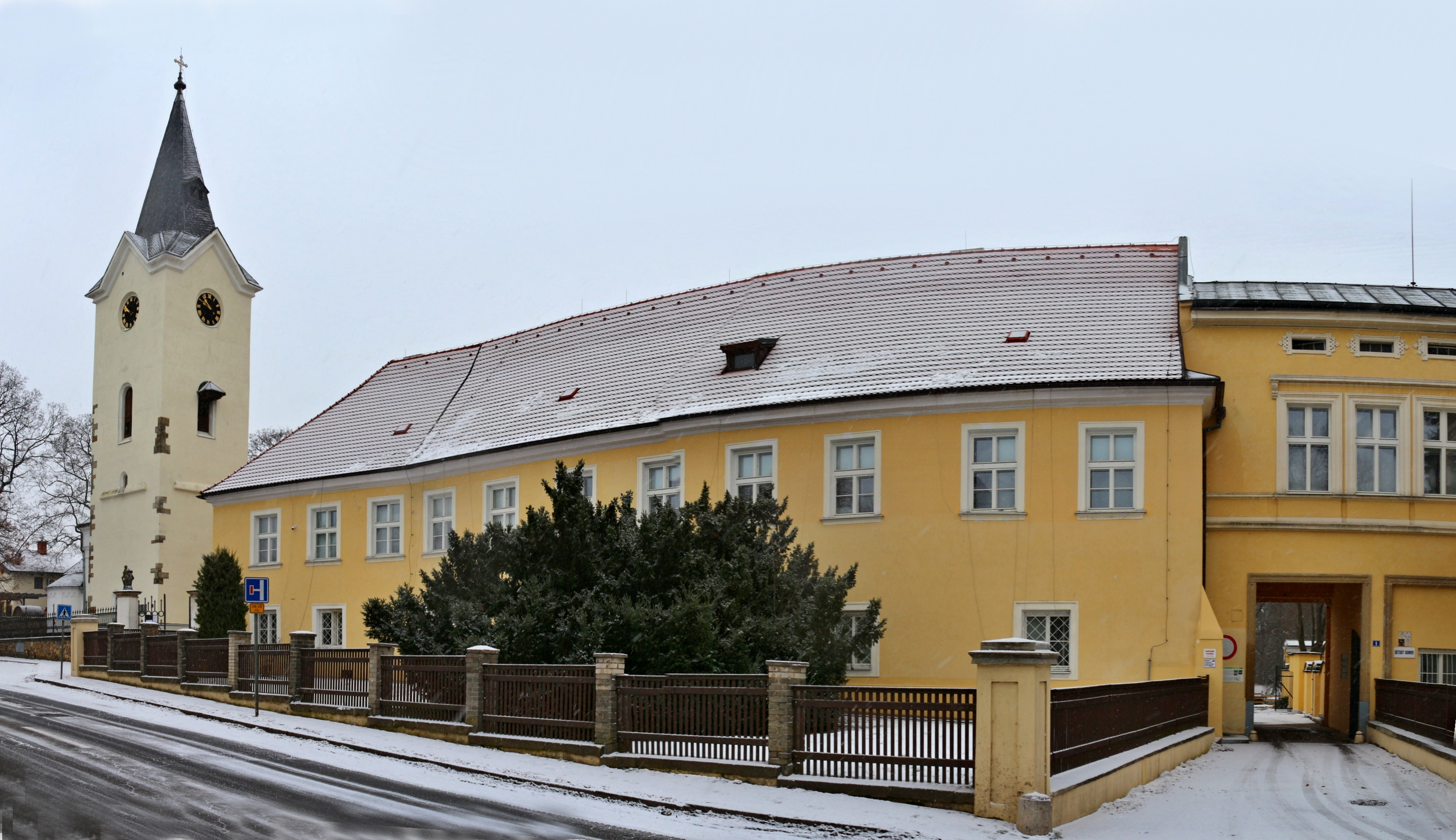 Zámek v Dolních Počernicích